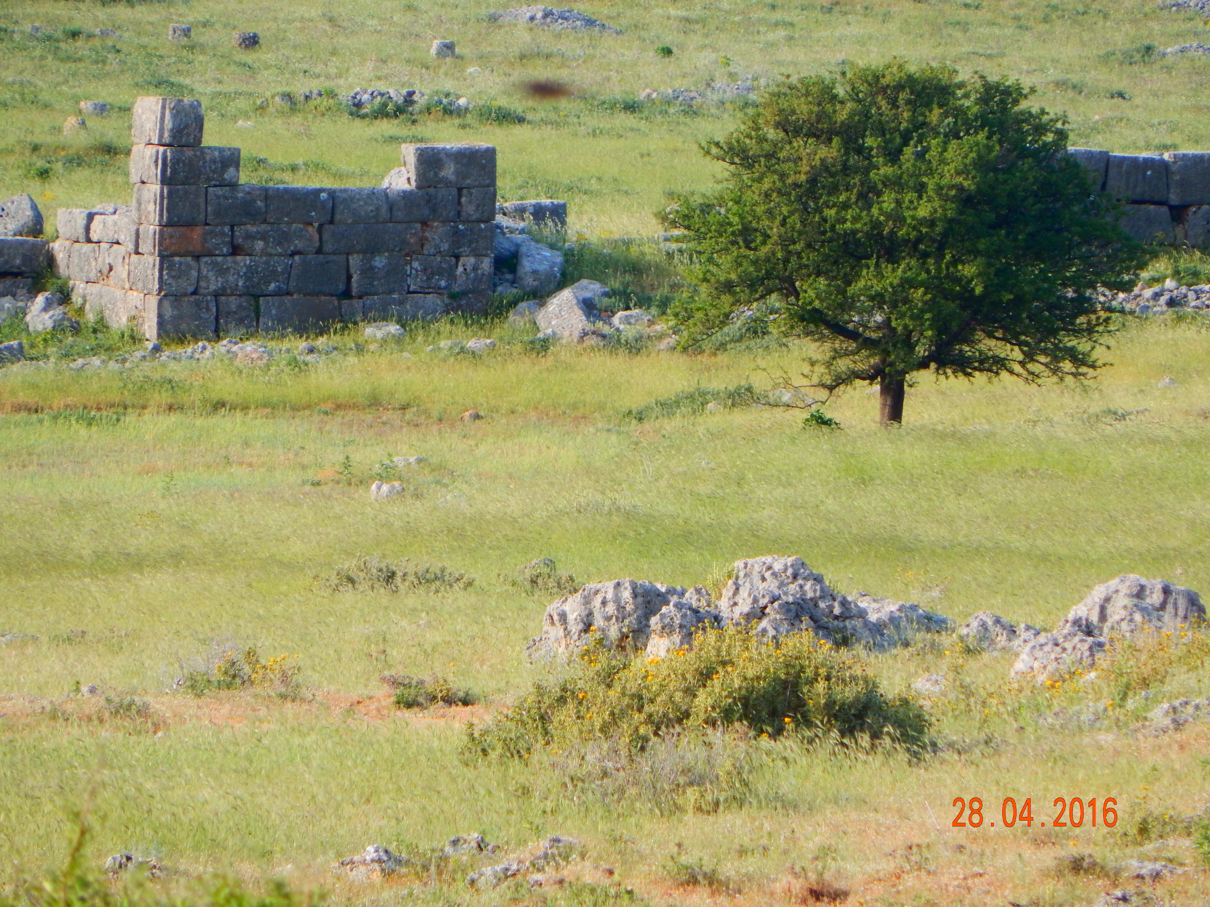 Πλαταιές«Πλαταιές»